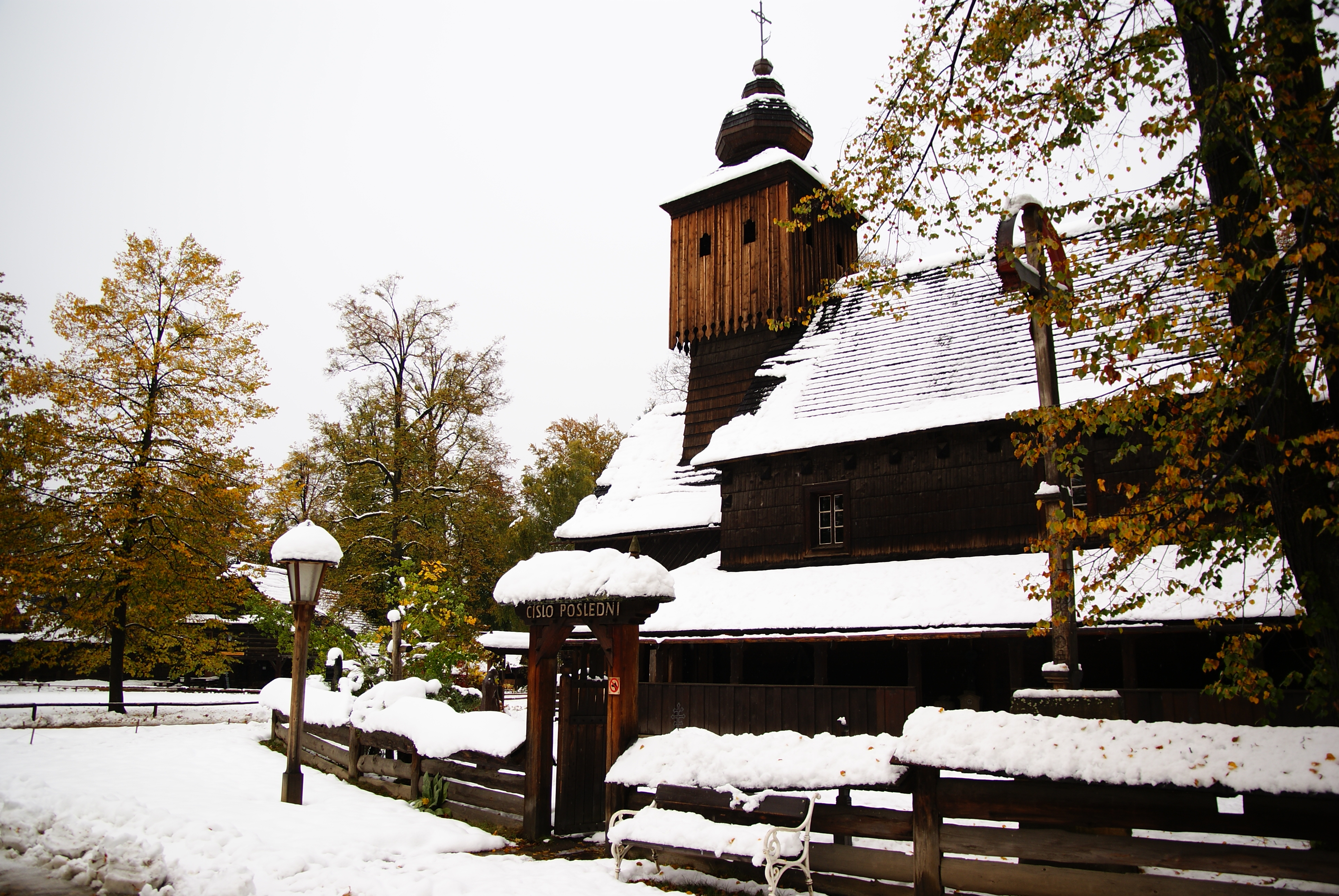 Muzeum - skanzen (Rožnov pod Radhoštěm), Rožnov pod Radhoštěm 242